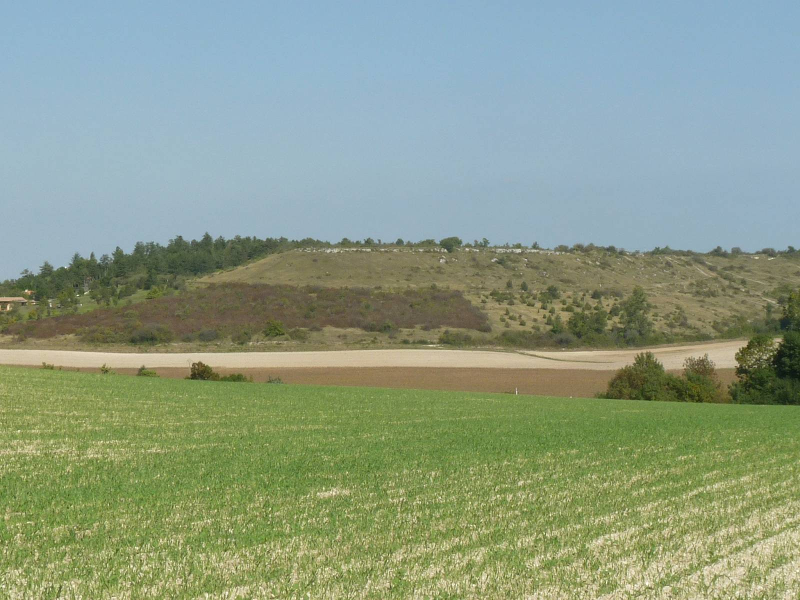 Chaumes de Vignac à Roullet (16), France